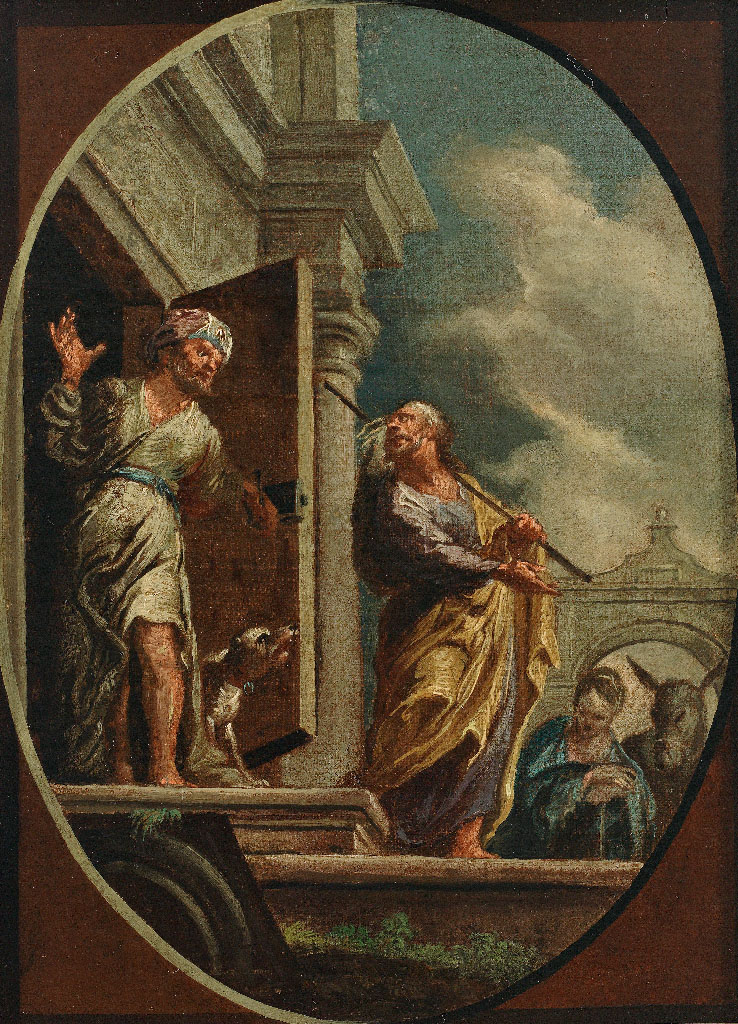 Die Hl. Familie auf Herbergssuche. Vermutlich Entwurf zu einem Deckenfresko. Öl auf Leinwand auf Holz. 31 x 23 cm